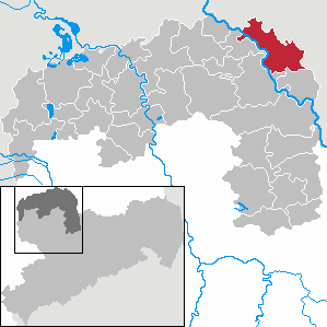 Beilrode in Saxony - Landkreis Nordsachsen